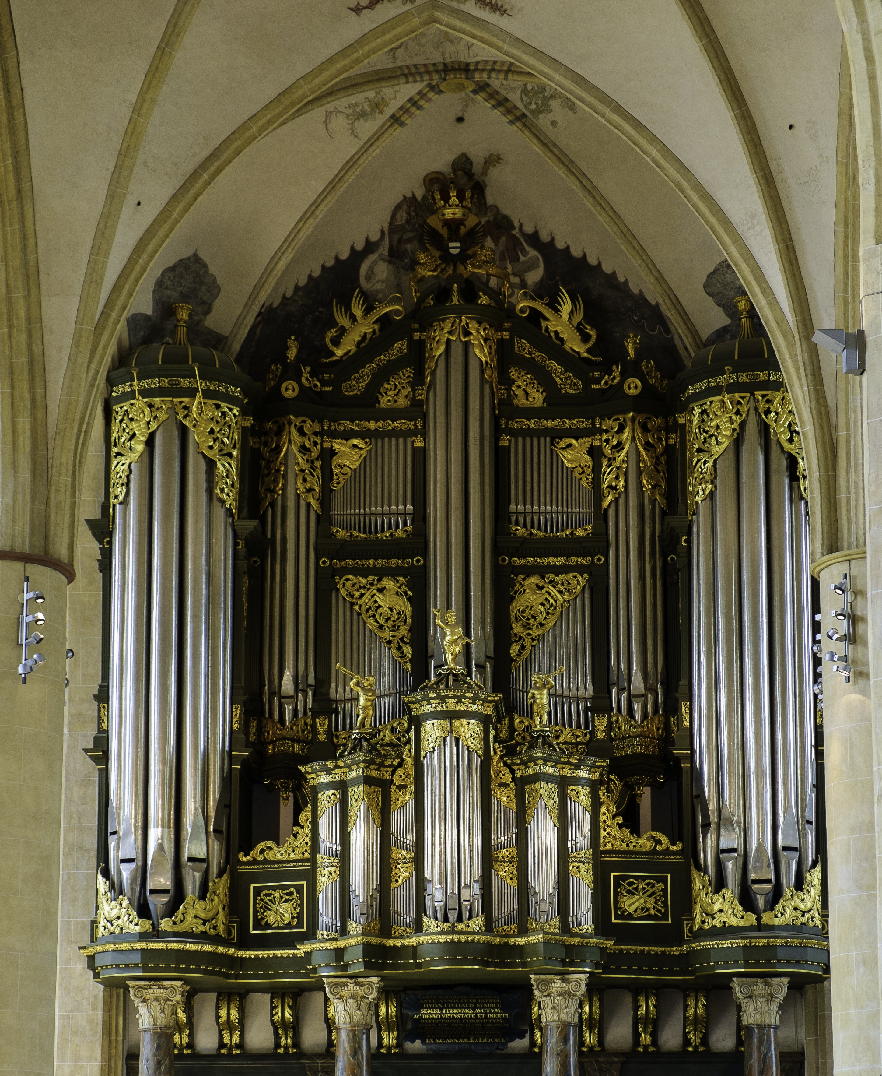 Schnitgerorgel in de Martinikerk in Groningen